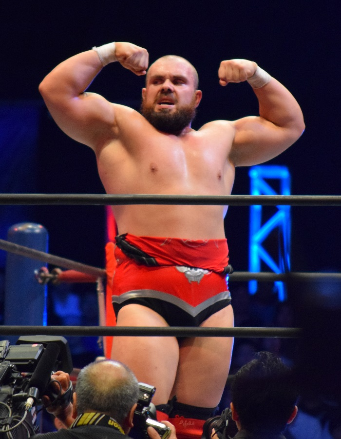 2015年8月1日 大阪府立体育会館 「G1 CLIMAX 25」 マイケル・エルガン